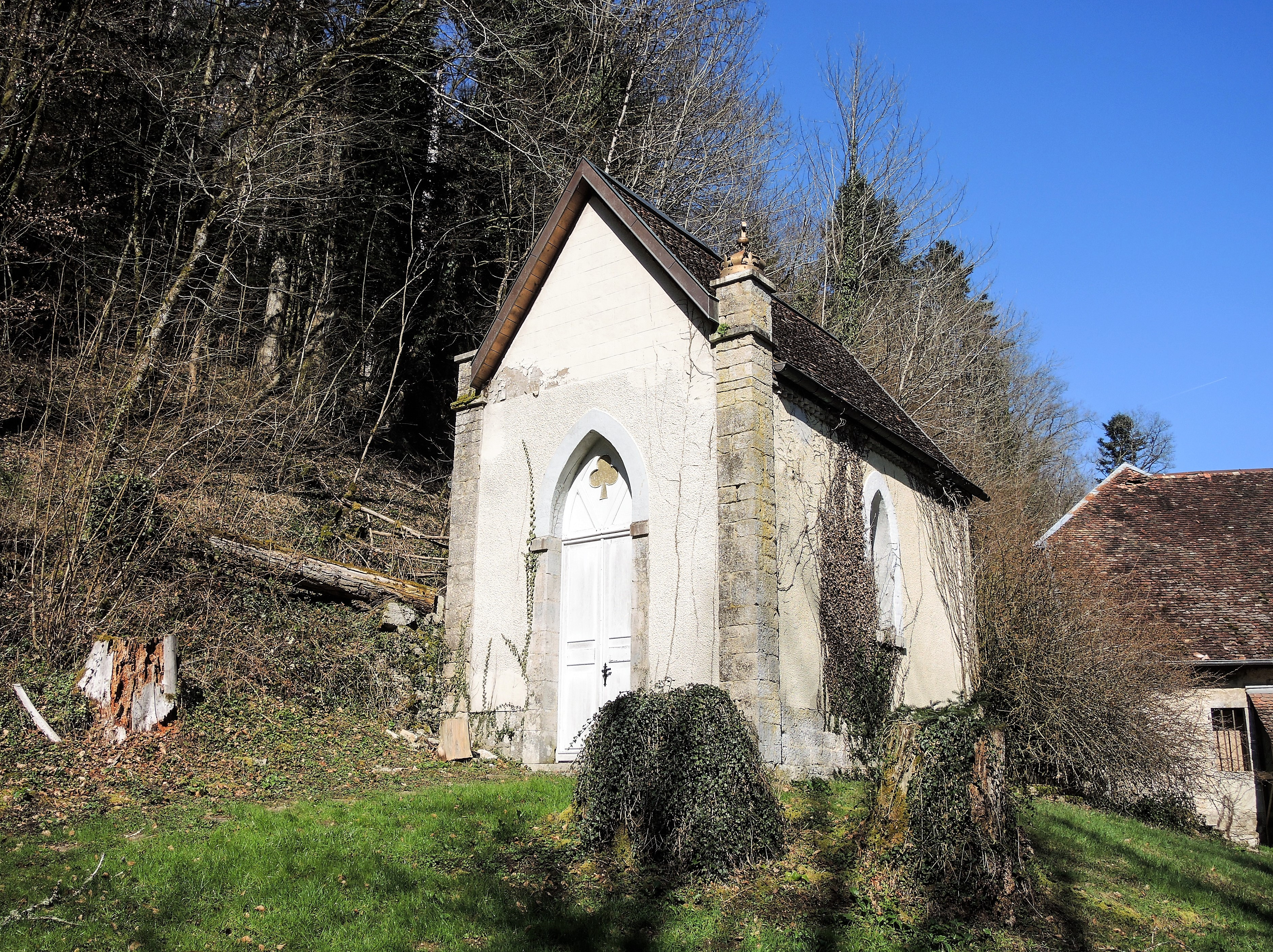 Chapelle de Bléfond. Silley-Bléfond. Doubs